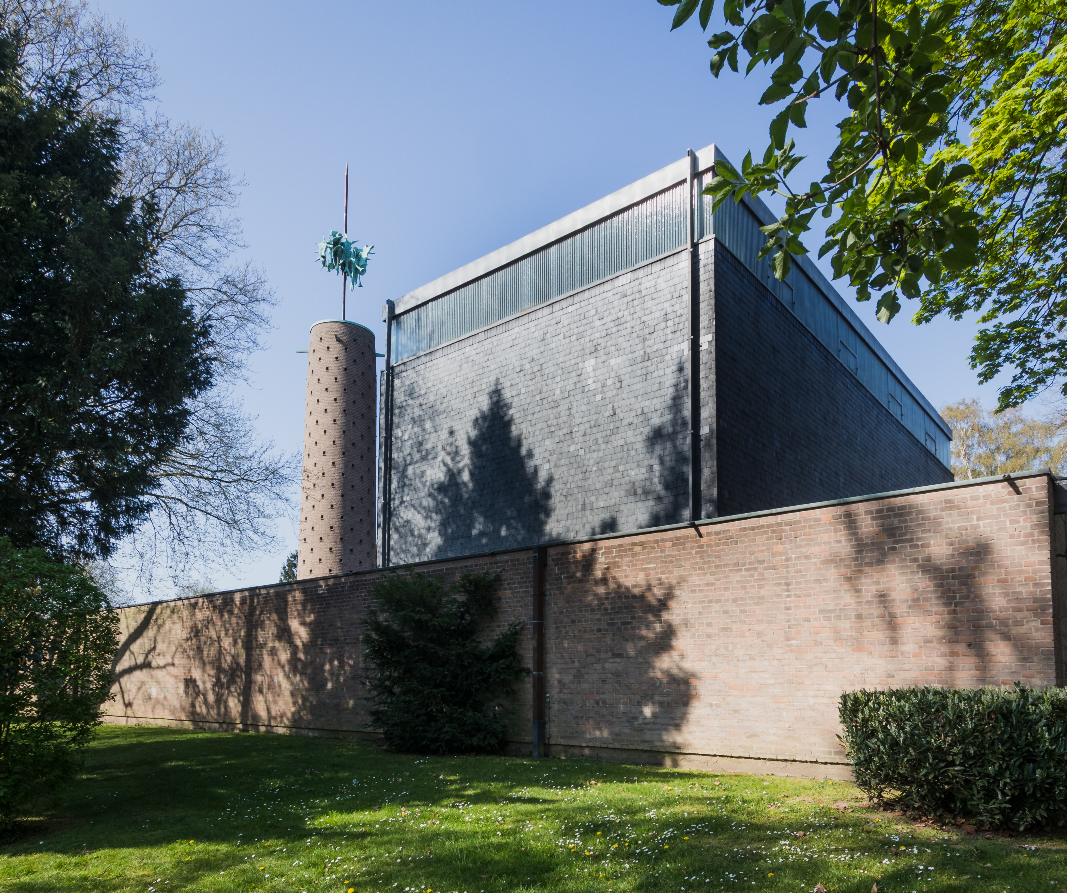 St. Pius X. in Flittard, Entwurf Margot und Joachim Schürmann